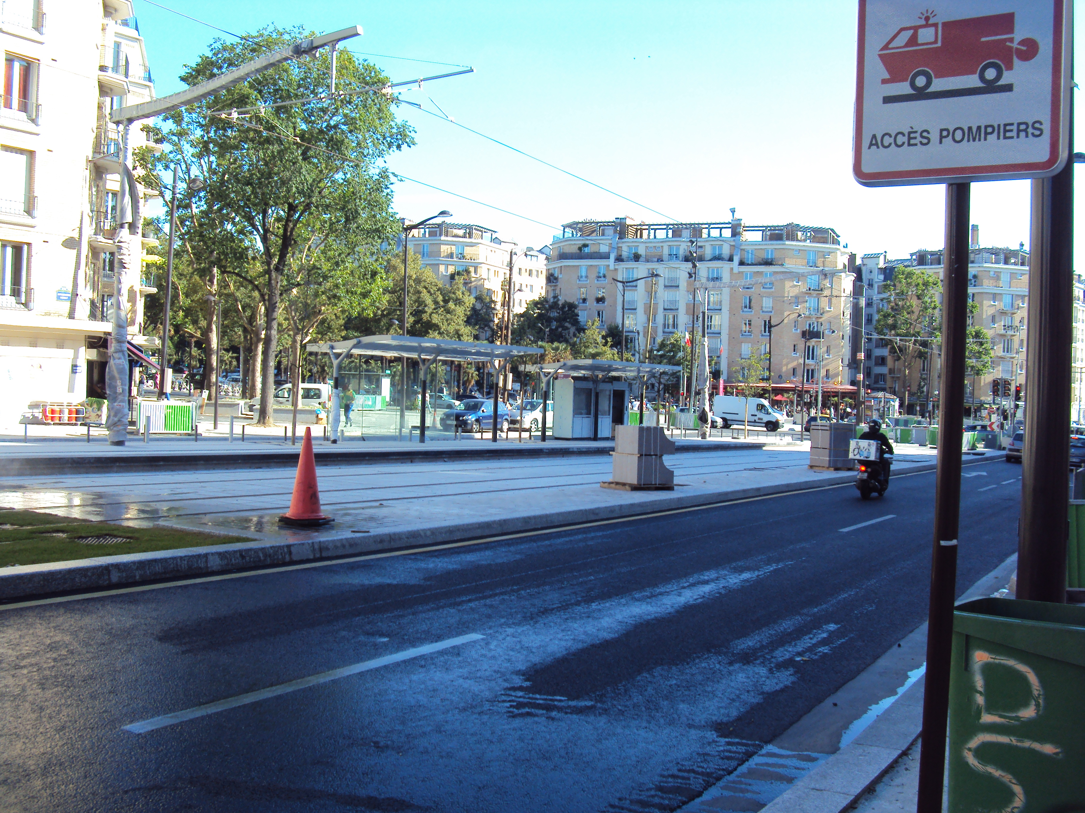 Travaux d'extension du T3 - Station porte Doree